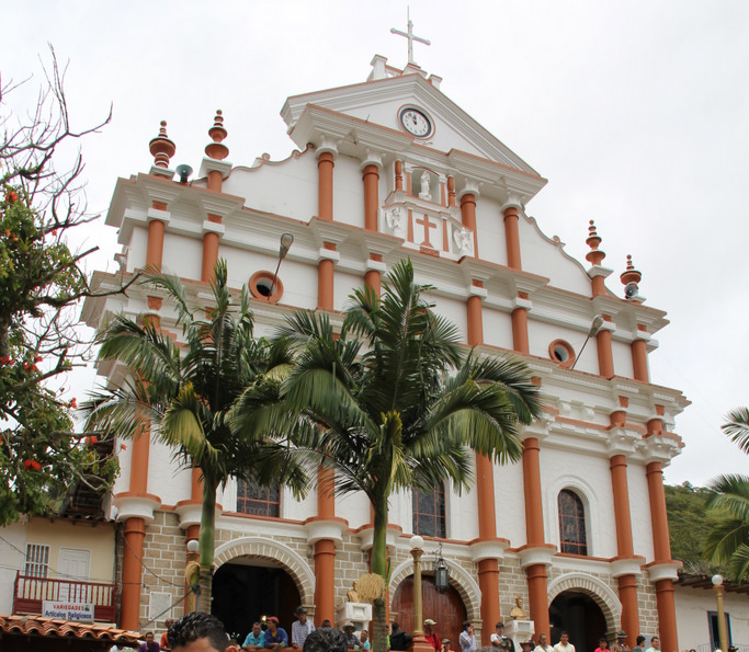 Sergio Fajardo Valderrama (entonces candidato a la Gobernación de Antioquia) realizando campaña en Angostura.